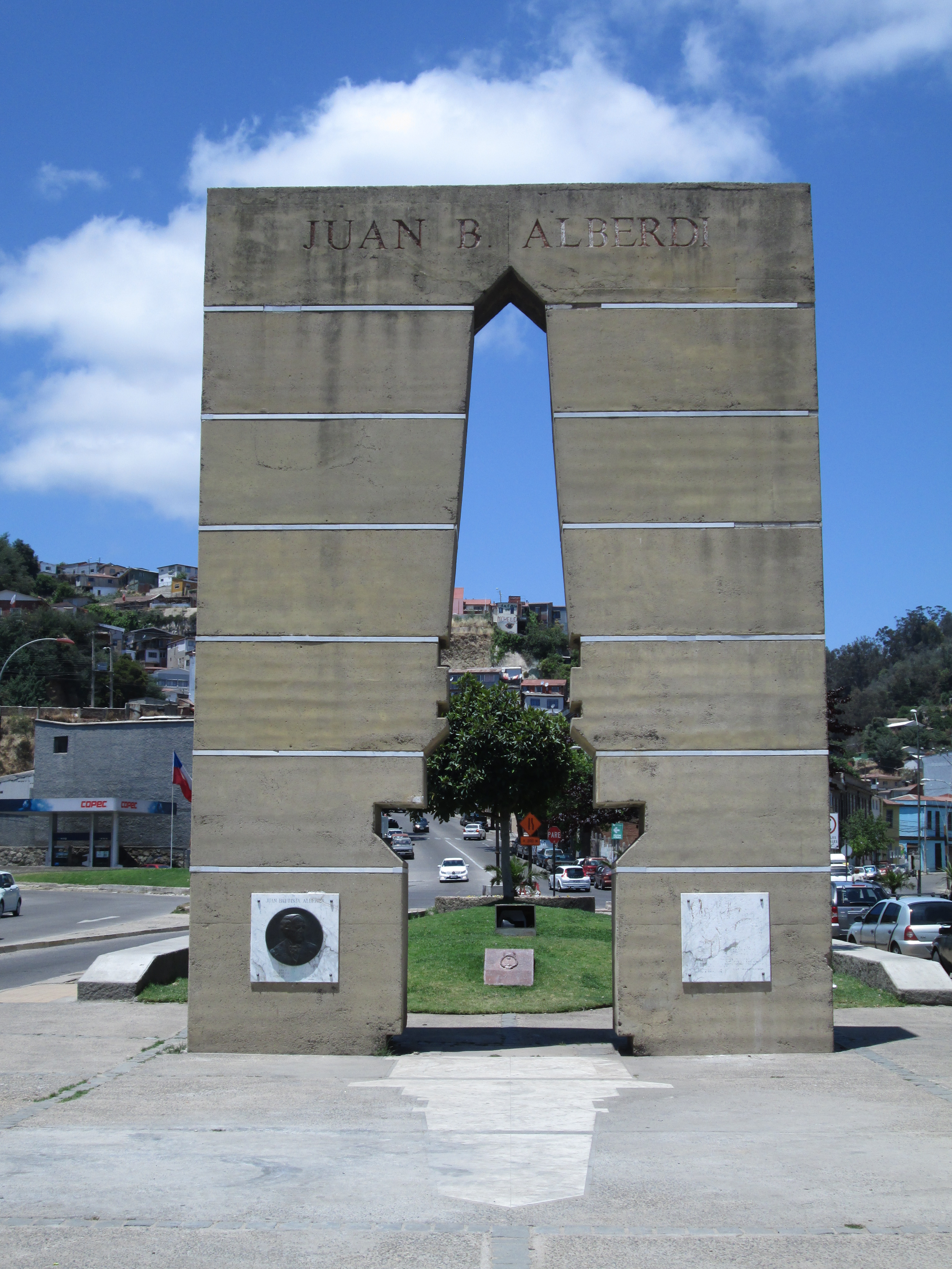 Monumento a Juan B. Alberdi, en la avenida Argentina, Valparaíso.